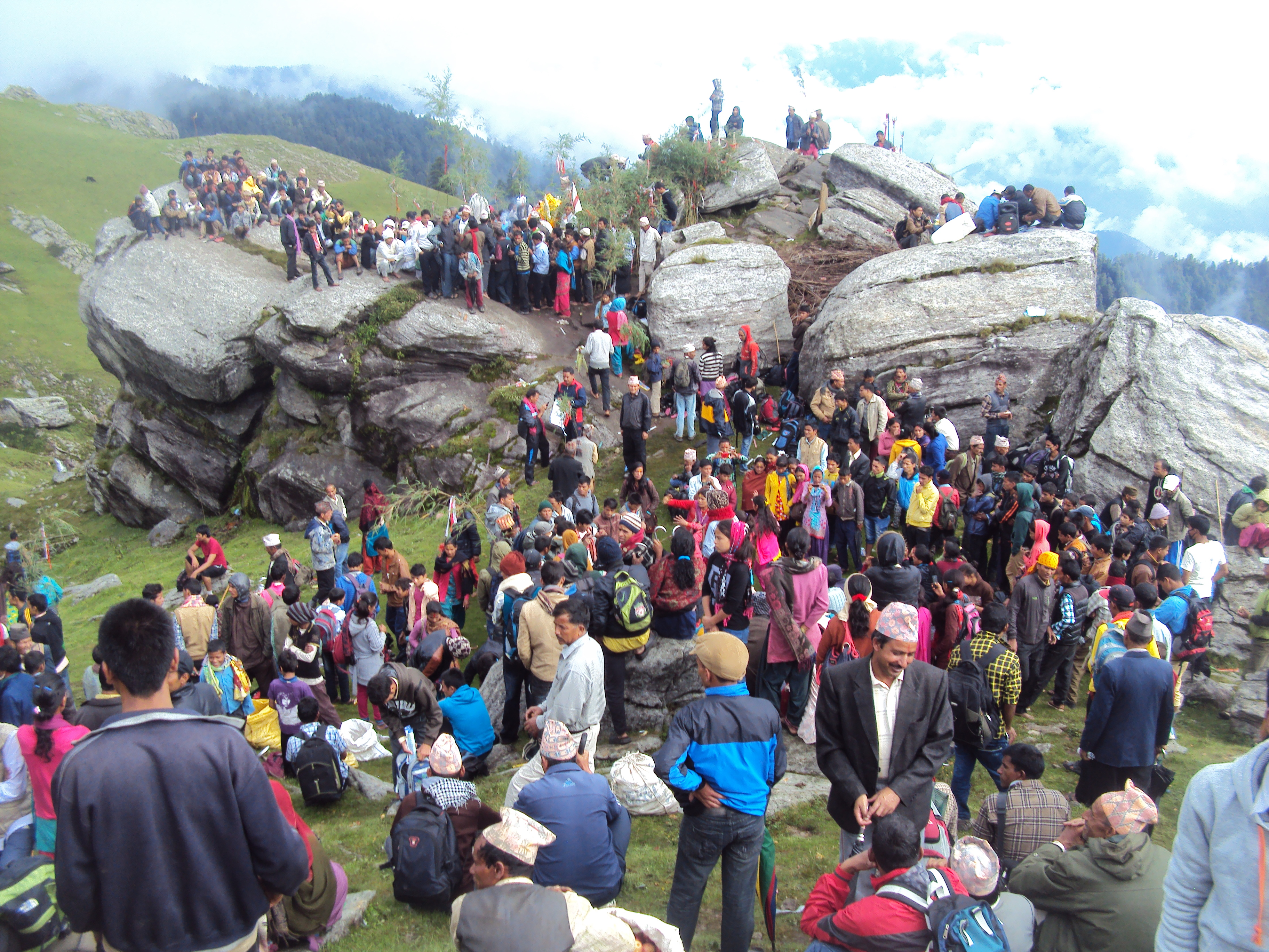 नेपाली: महाबुधाम मेलाको एक झलक